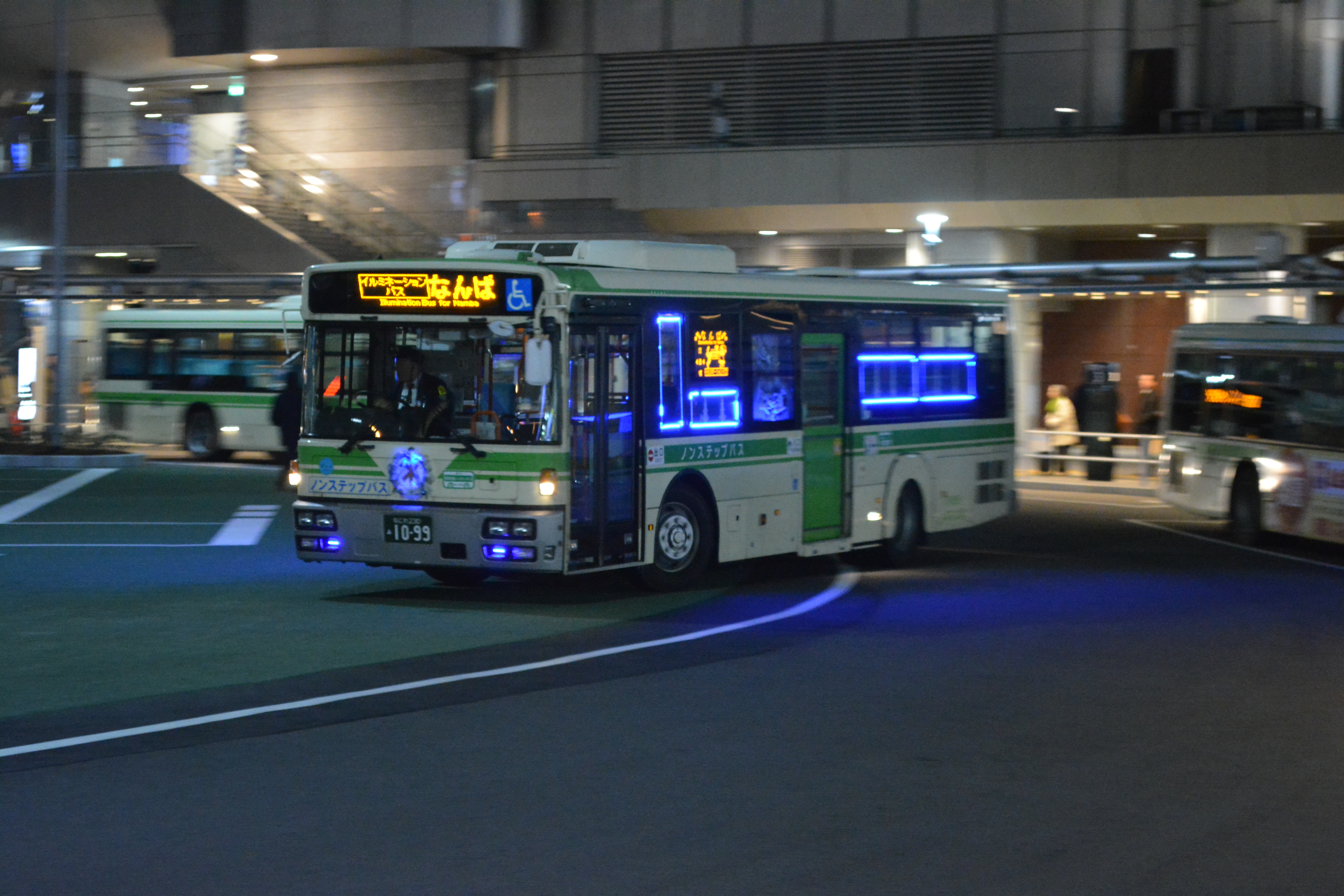 77-1099 PDG-RA273KAN (酉島営業所)